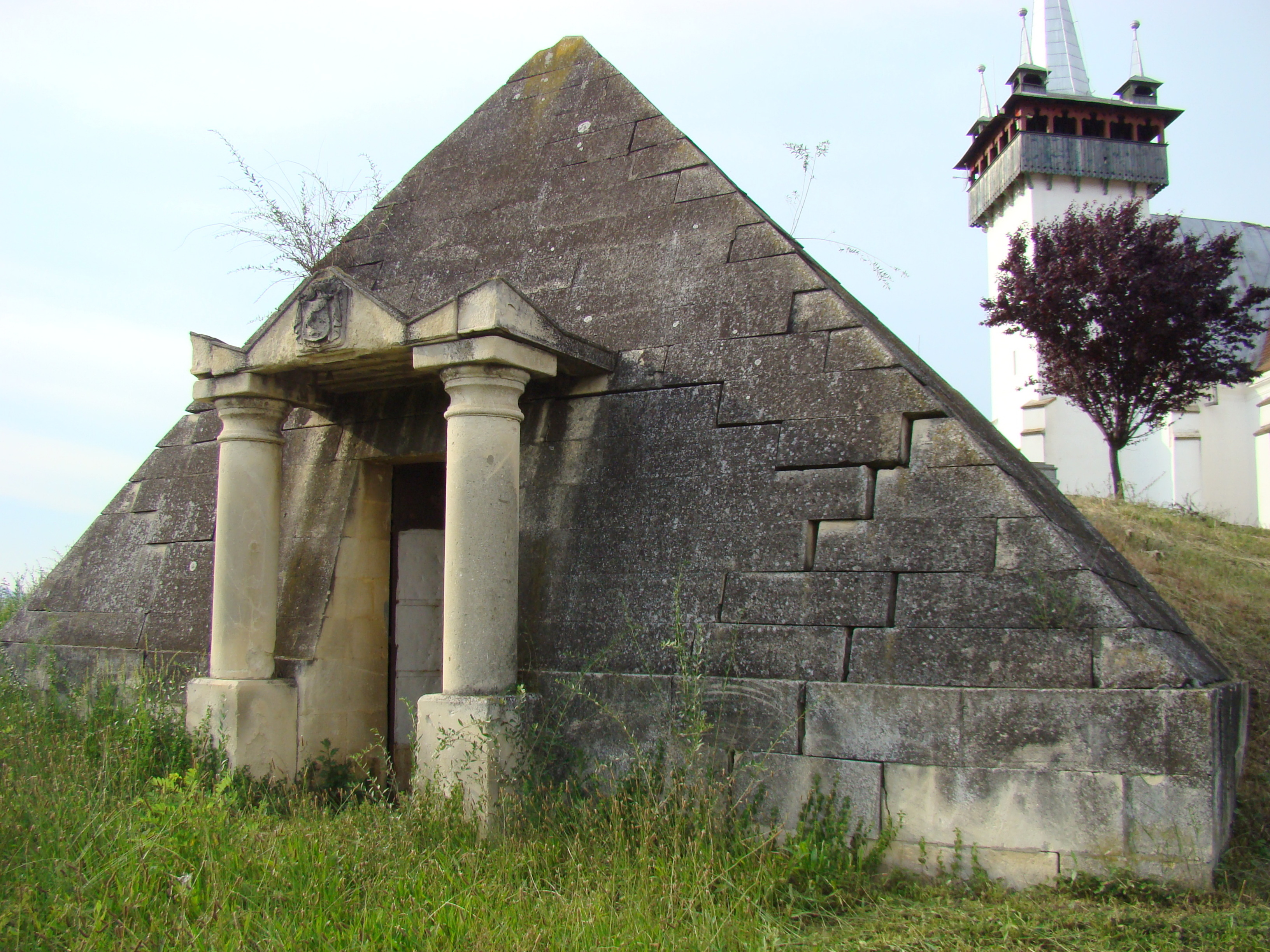 Cripta Kemeny Arpad, sat aparținător Ciumbrud; municipiul Aiud 02